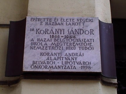 Korányi Sándor emléktáblája a Váci utcában (Budapest)